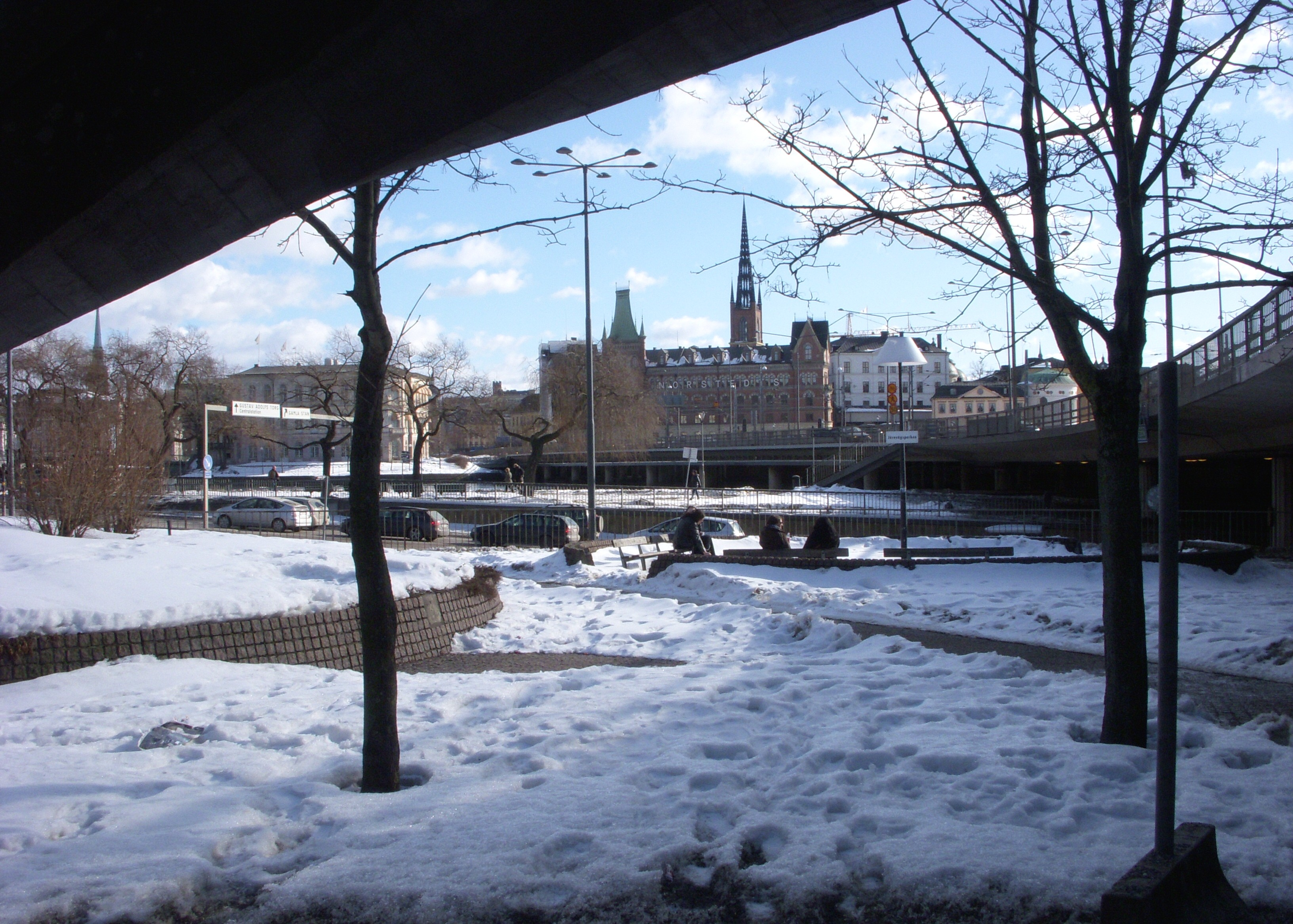 Järnvägaparken i Stockholm